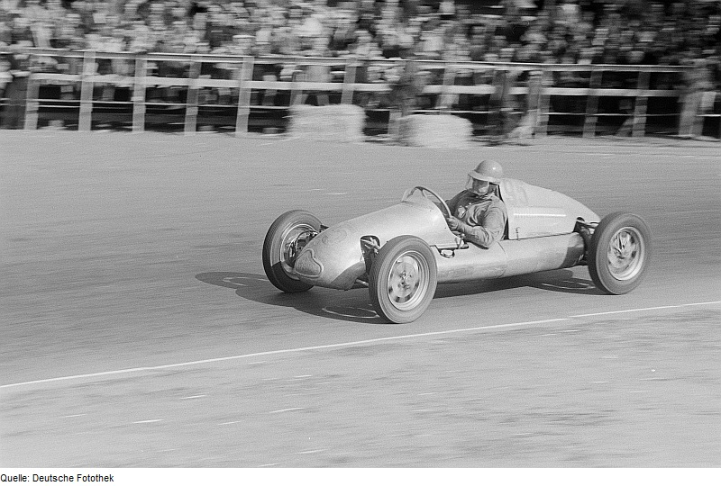 Original image description from the Deutsche Fotothek Automobilrennfahrer in seinem Wagen mit der Nummer 95 beim 6. Leipziger Stadtparkrennen Kurt Ahrens Sr. takes a corner in his Cooper-Norton racing car, at the 6th Leipziger Stadtparkrennen (1954-05-16).